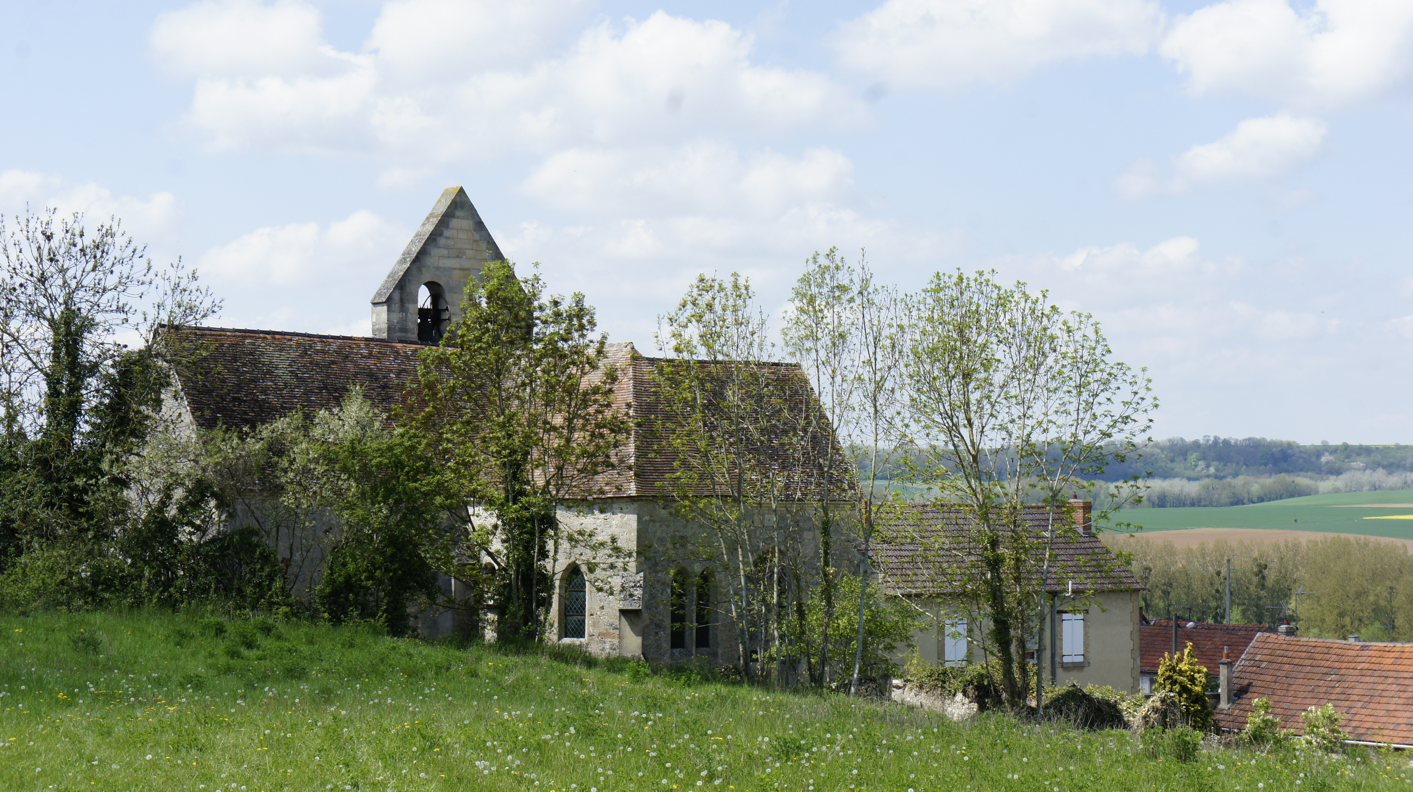 église de Magneux (Marne) .